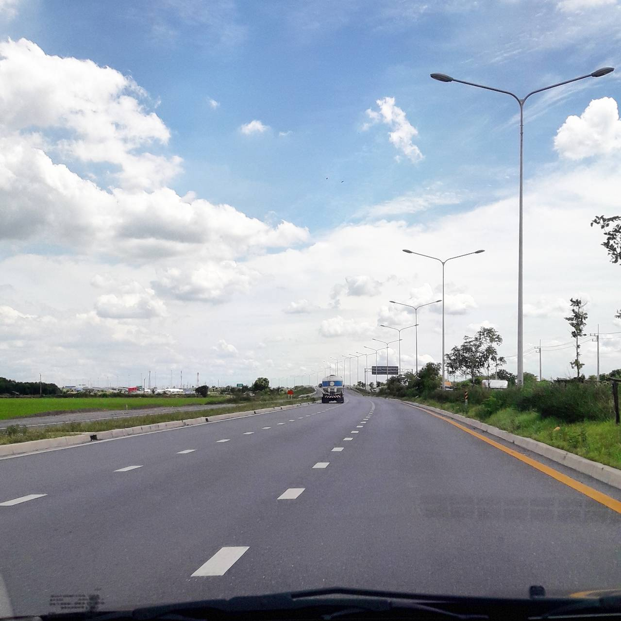 ถนนราชพฤกษ์ช่วงอำเภอเมืองปทุมธานี จังหวัดปทุมธานี